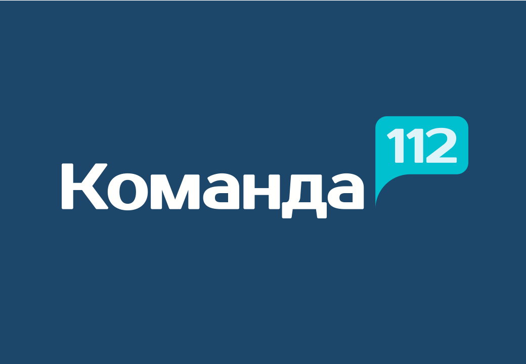 Логотип федерального проекта предупреждения ЧС усилиями добровольцев